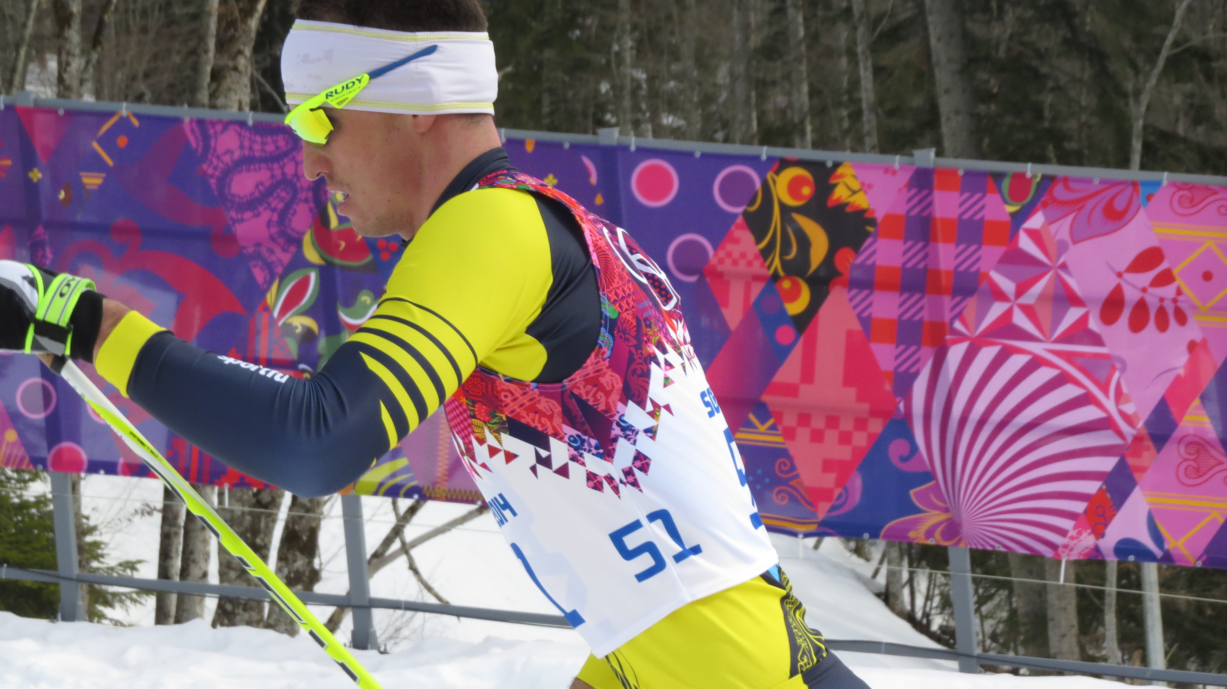 Лыжные гонки на зимних Олимпийских играх 2014 — 15 км классическим стилем (мужчины)